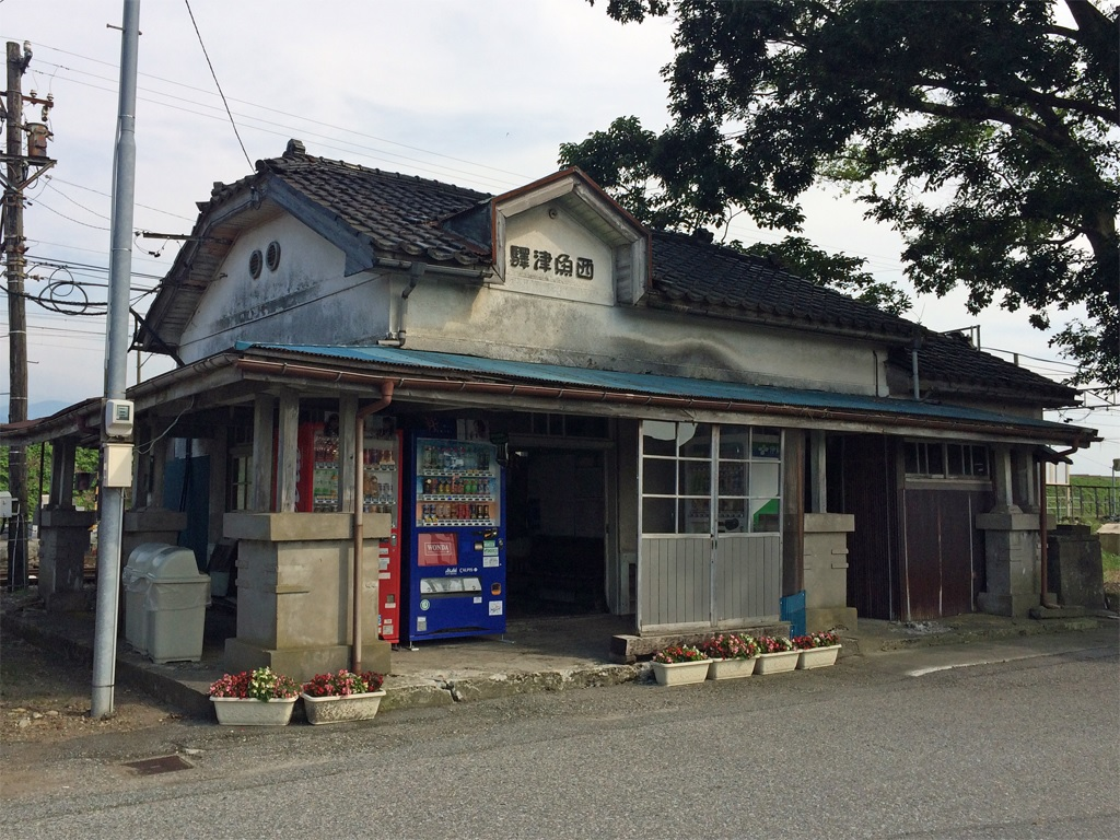 富山地方鉄道本線西魚津駅駅舎